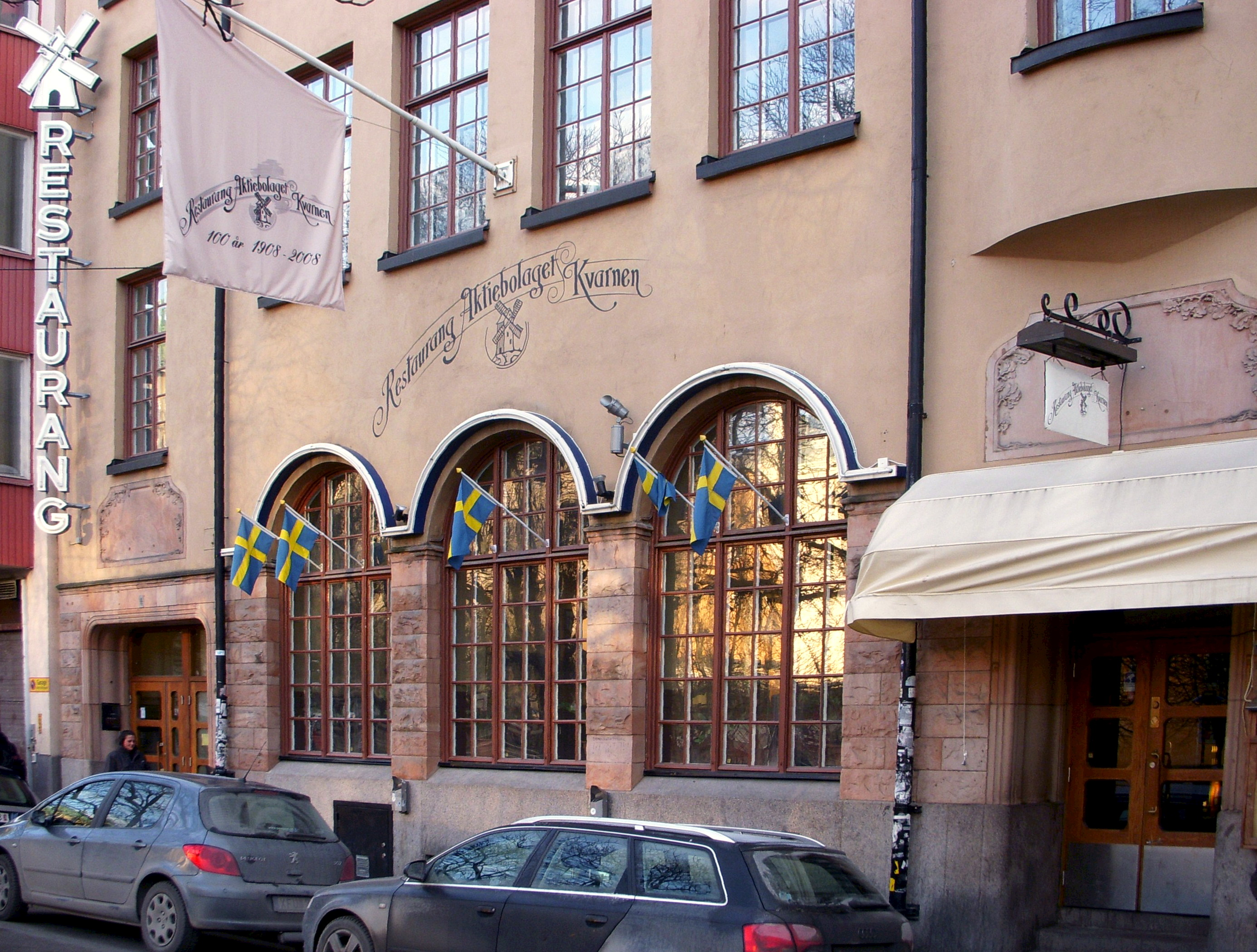 Restaurang Aktiebolaget "Kvarnen", Tjärhovsgatan 41 på Söder i Stockholm. Arkitekt: Sam Kjellberg (1868-1939). Byggår: 1908. Byggnaden uppfördes för Stockholms utskänkningsaktiebolags räkning som kroglokaler eller värdshus.